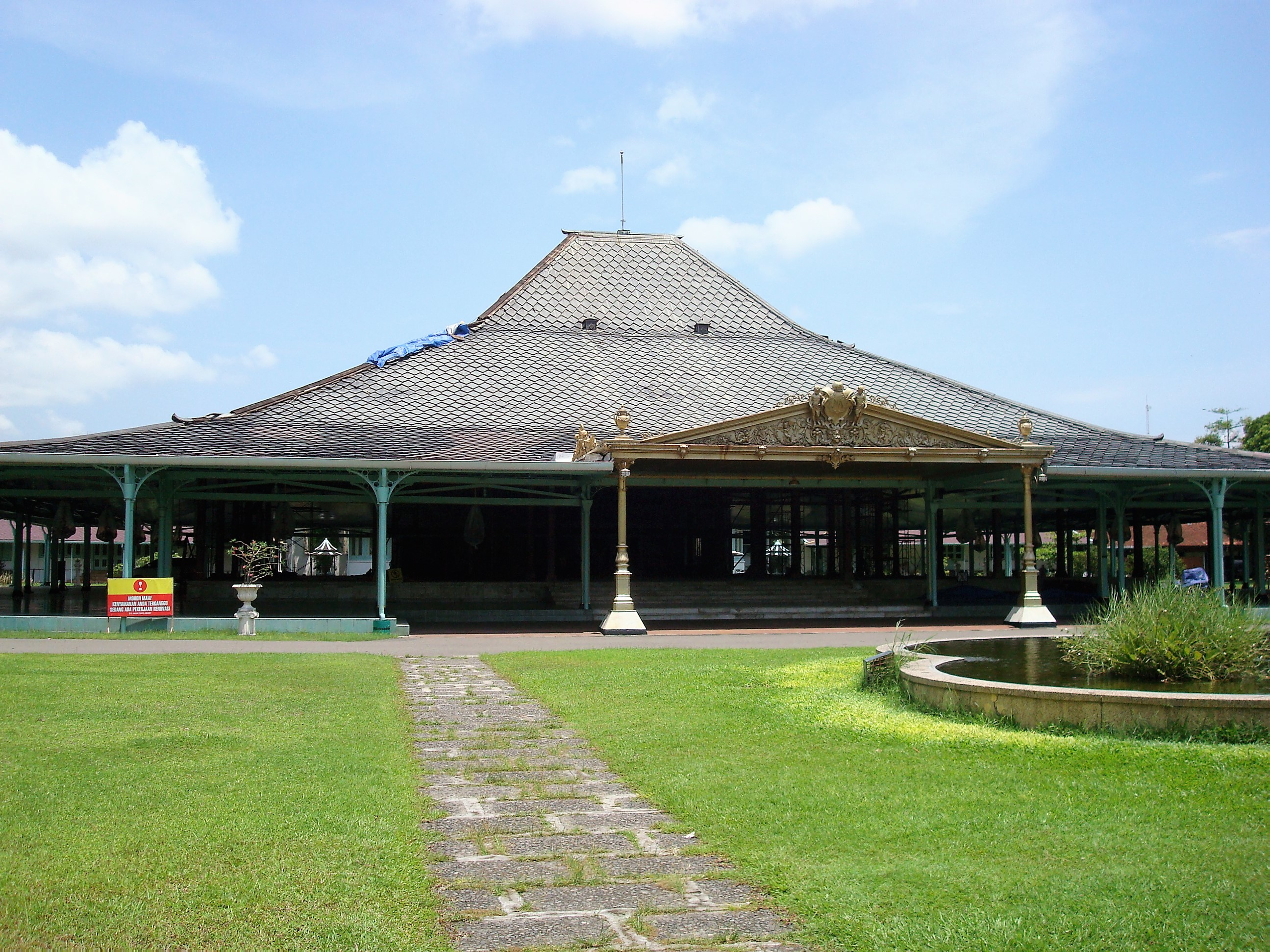 Im Mangkunegaran Palace